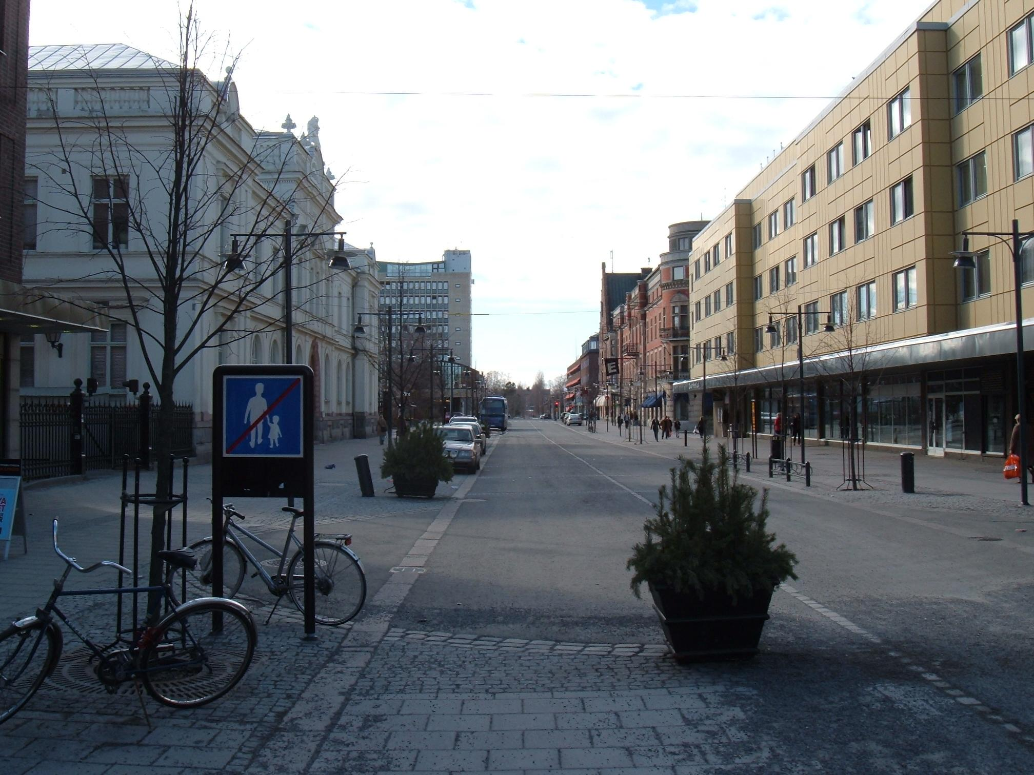 Storgatan, Luleå, Sweden